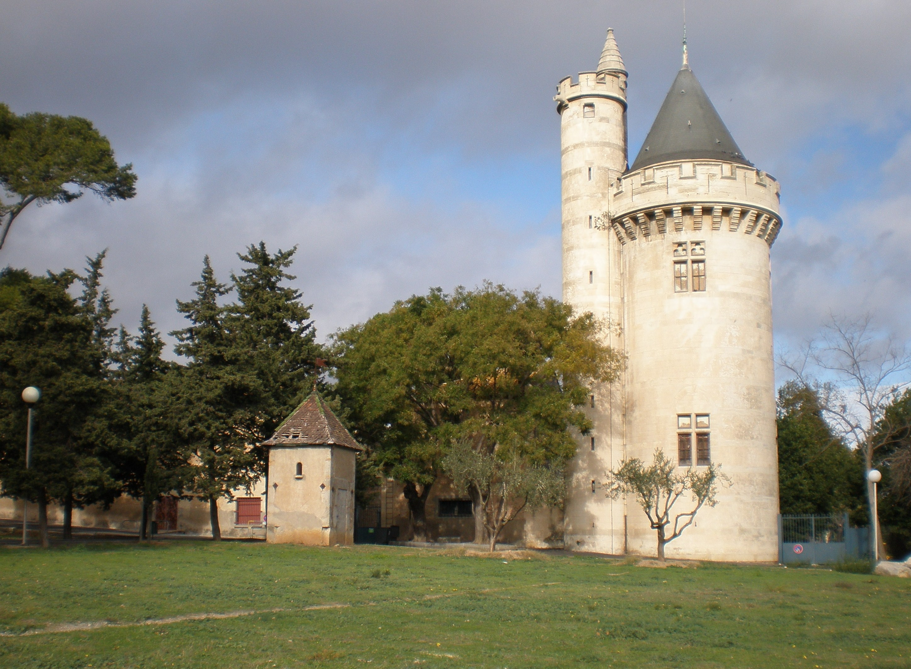 Domaine de Saint-Jean-d'Aureilhan, tour néo-gothique (XIXème siècle) à Béziers (France)